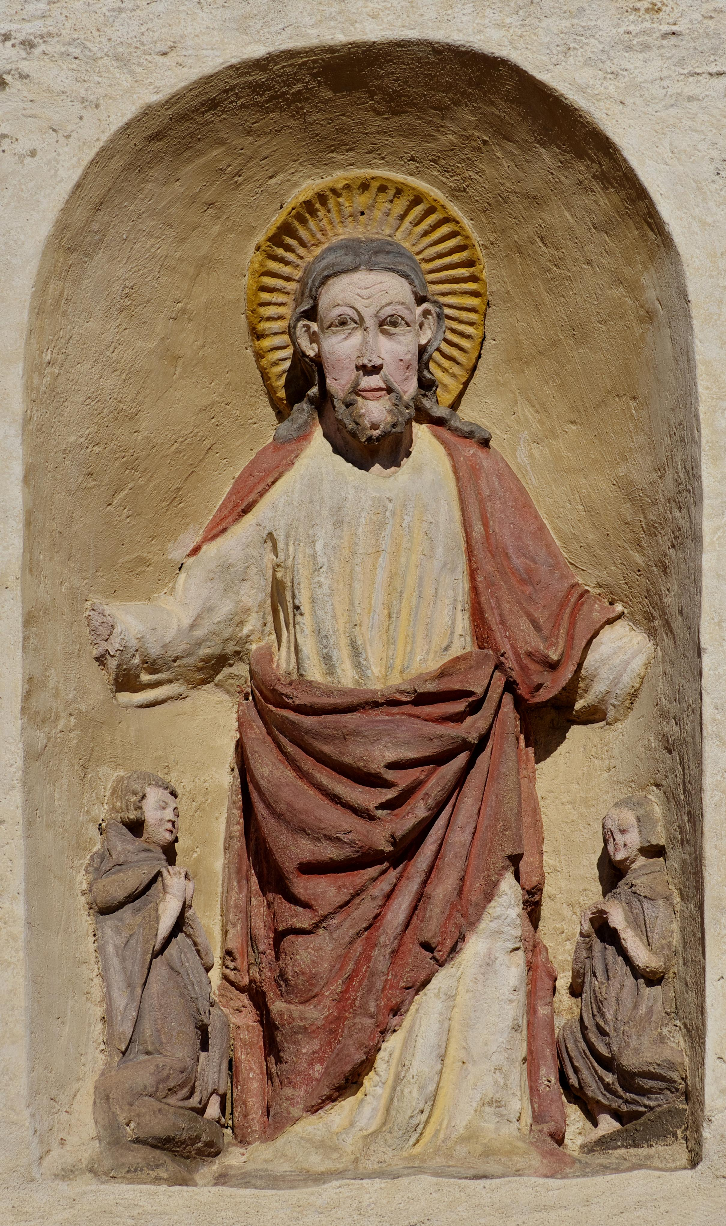 Figurengruppe über dem Hauptaltar